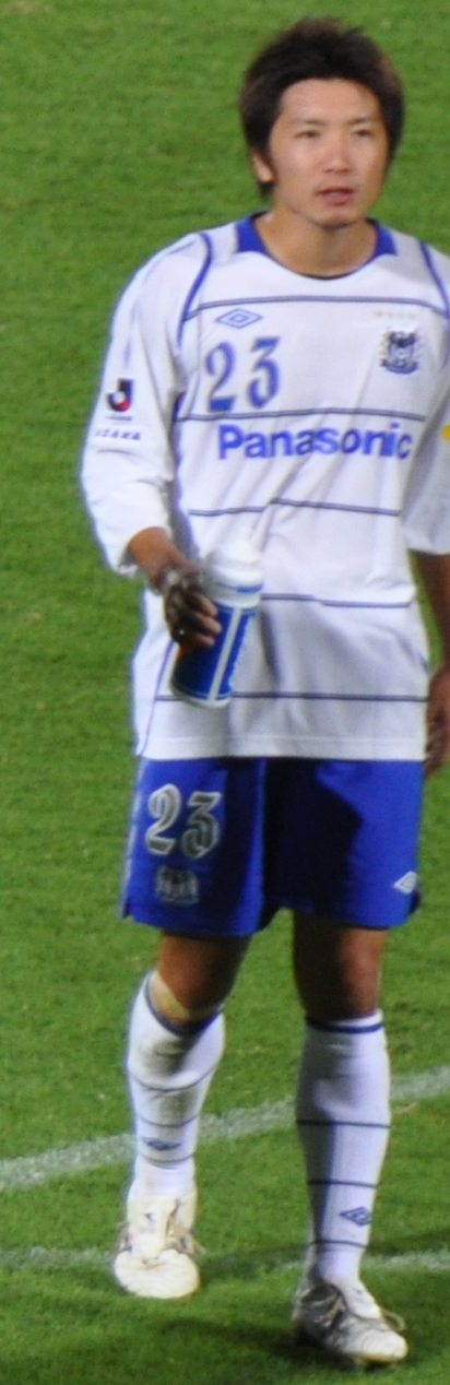 Takuya Takei, Kawasaki Frontale vs Gamba Osaka_442